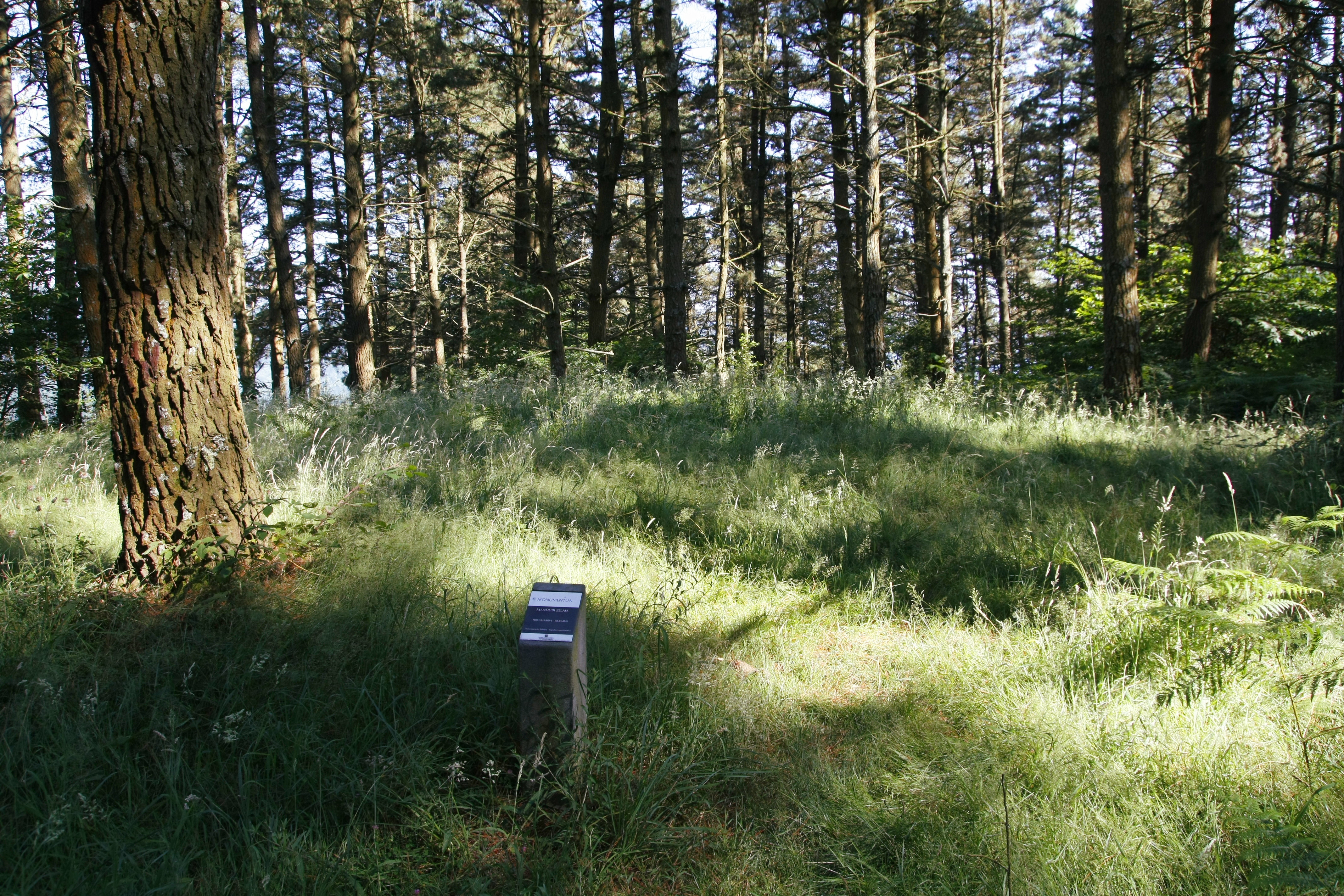 Mandubi Zelaia trikuharria